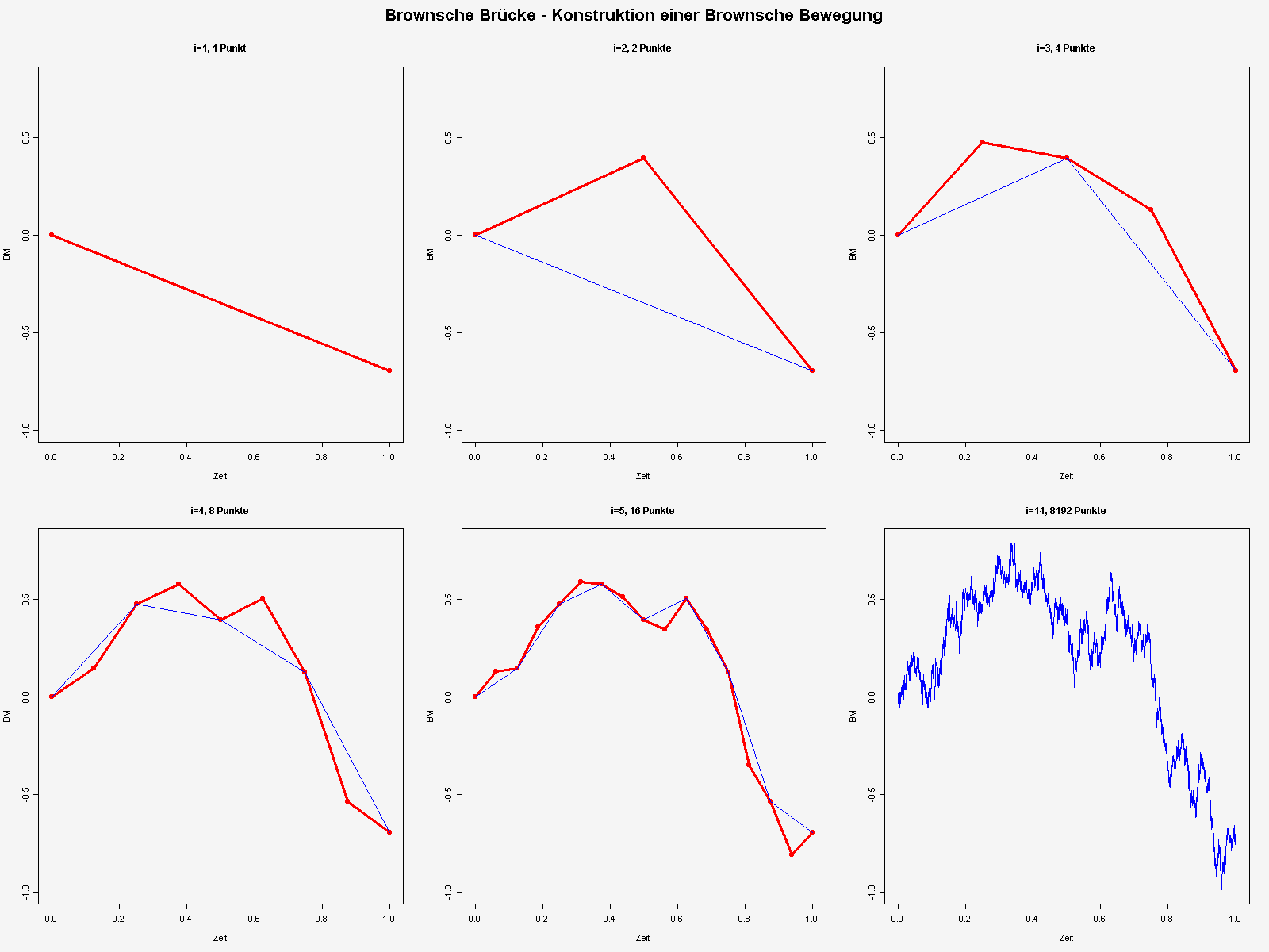 Algorithmische Konstruktion der Brownschen Bewegung als Summe von normalverteilten Zufallsgrößen